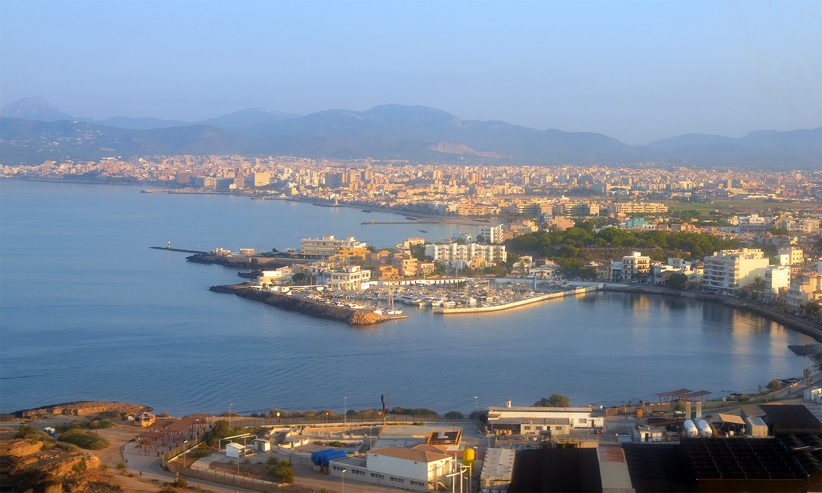 Пальма - вид с моря